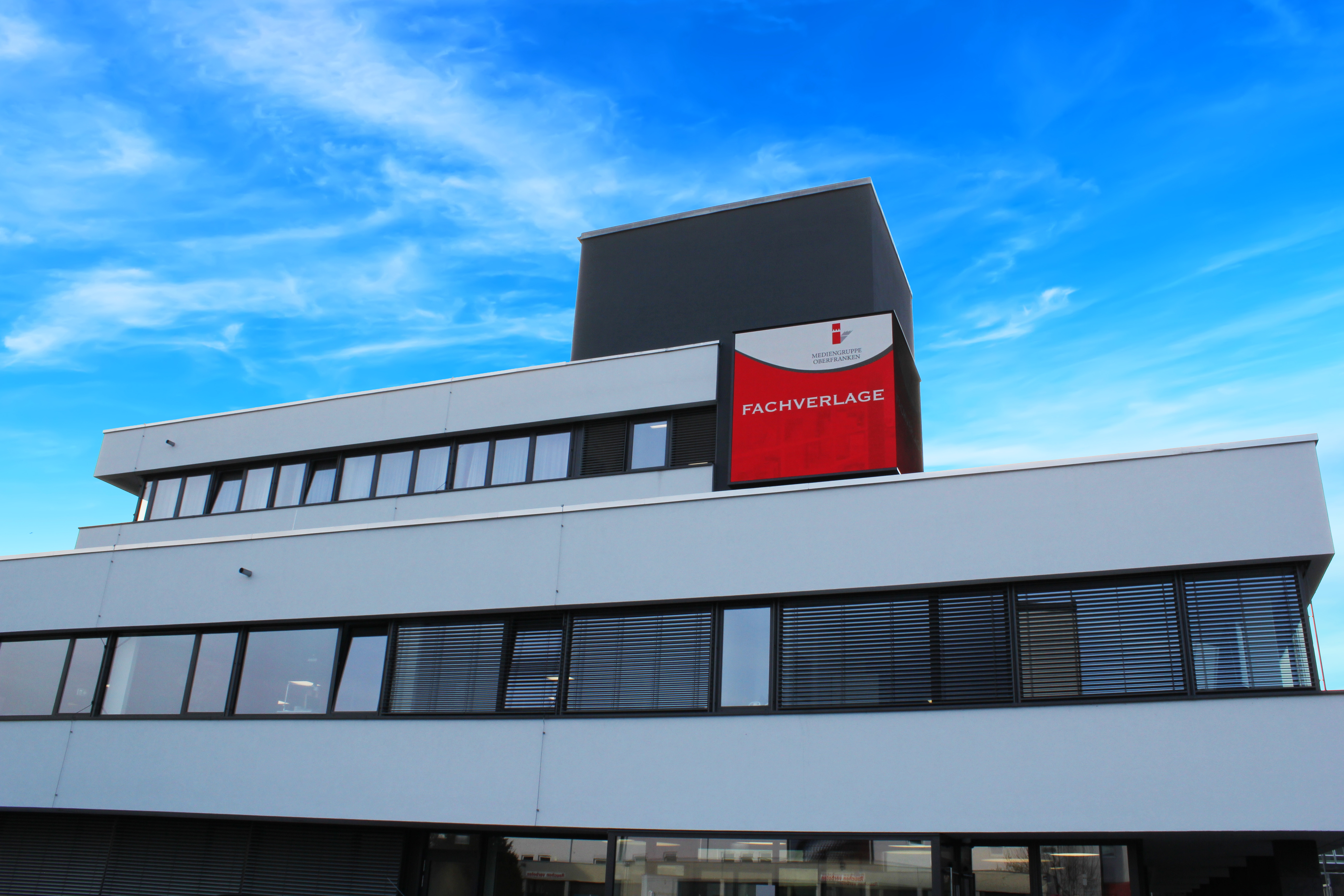 Sitz der Mediengruppe Oberfranken - Fachverlage in Kulmbach (Stand 2019).